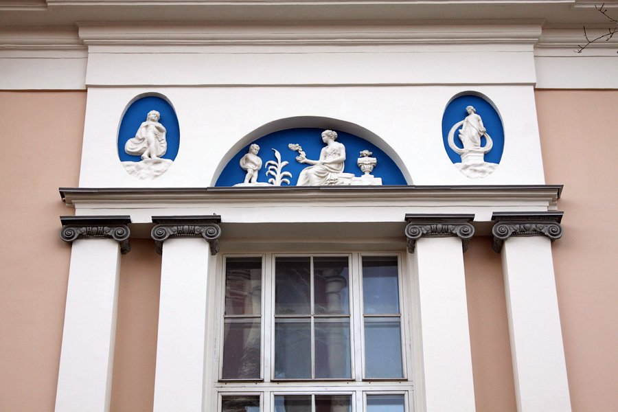 Элементы главного фасада дома губина